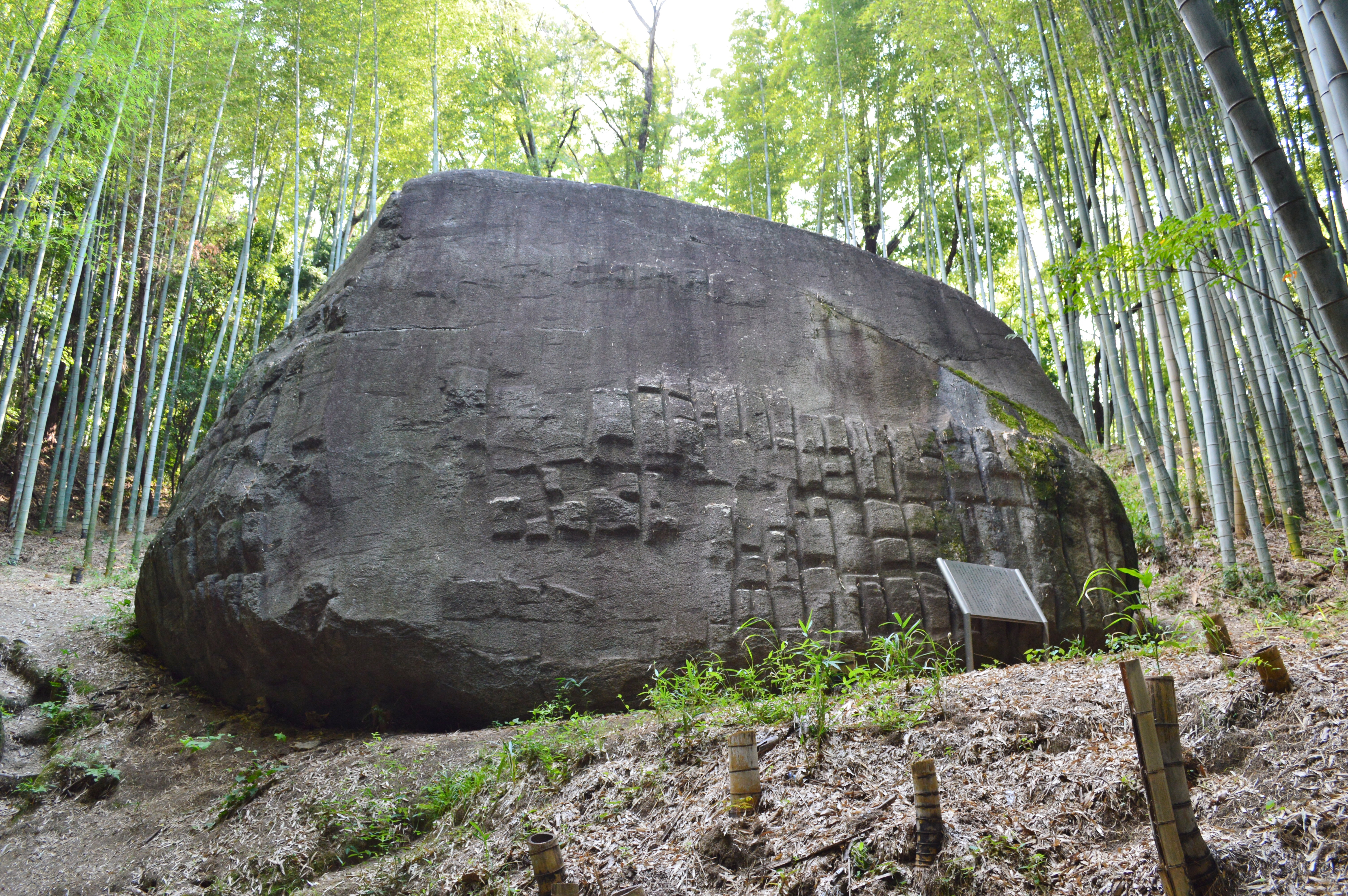 益田の岩船 北面